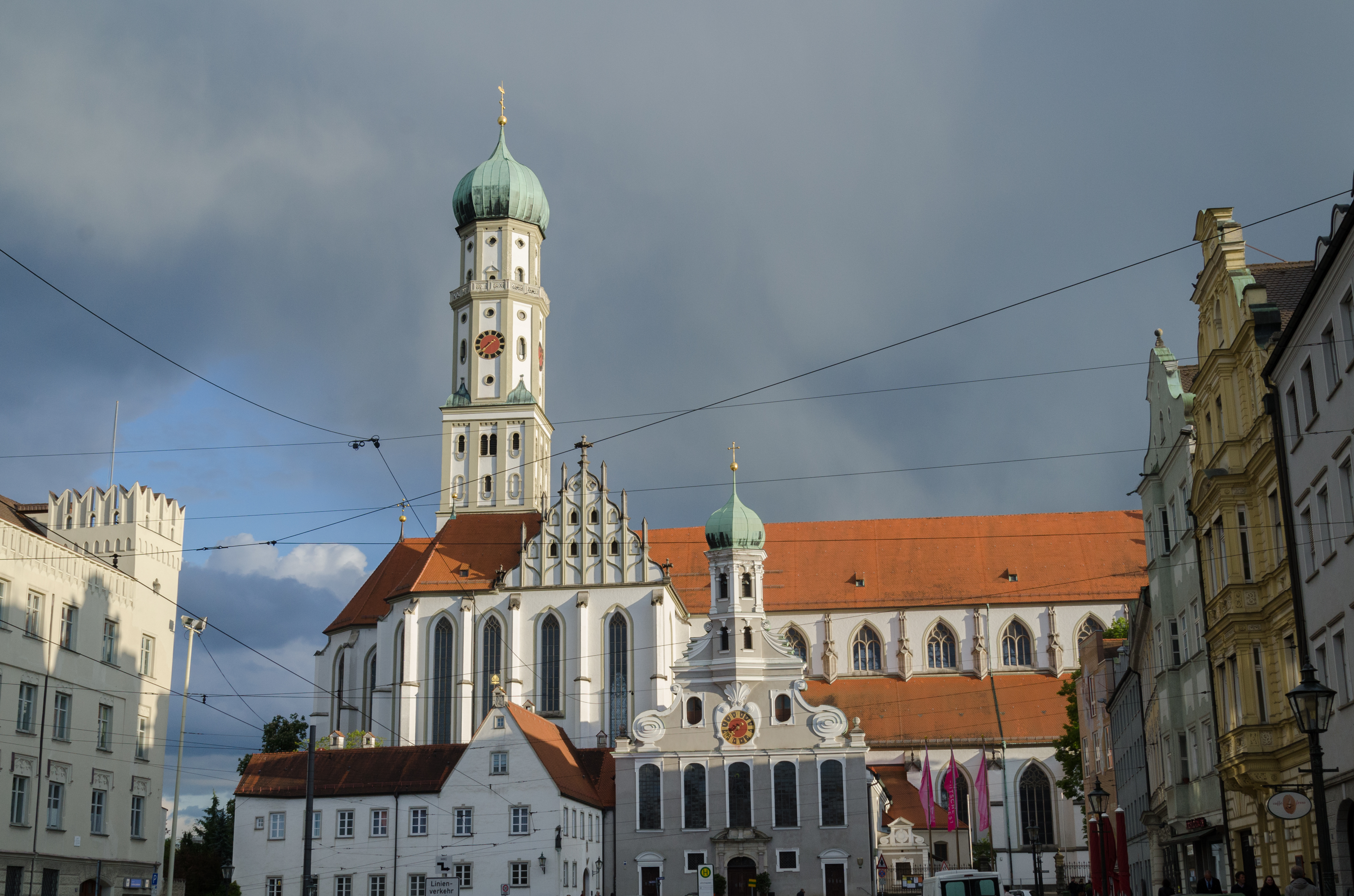 Augsburg, Basilika St. Ulrich und Afra